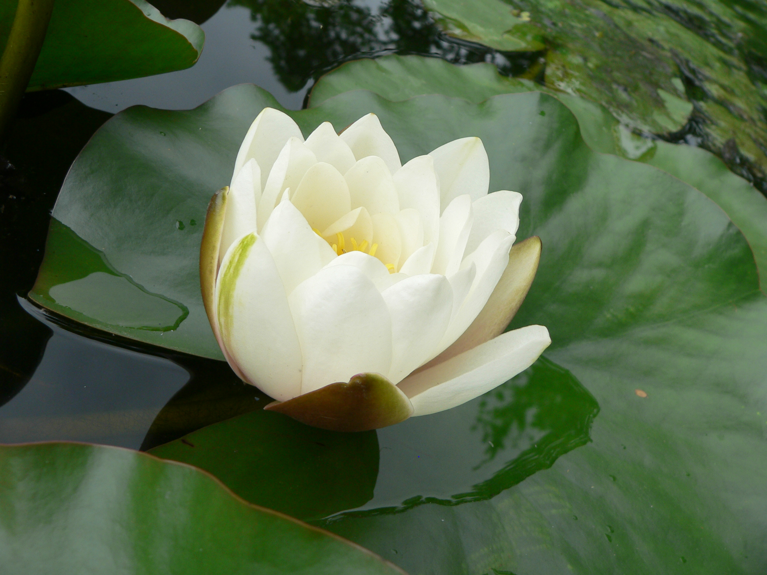 Nymphae alba